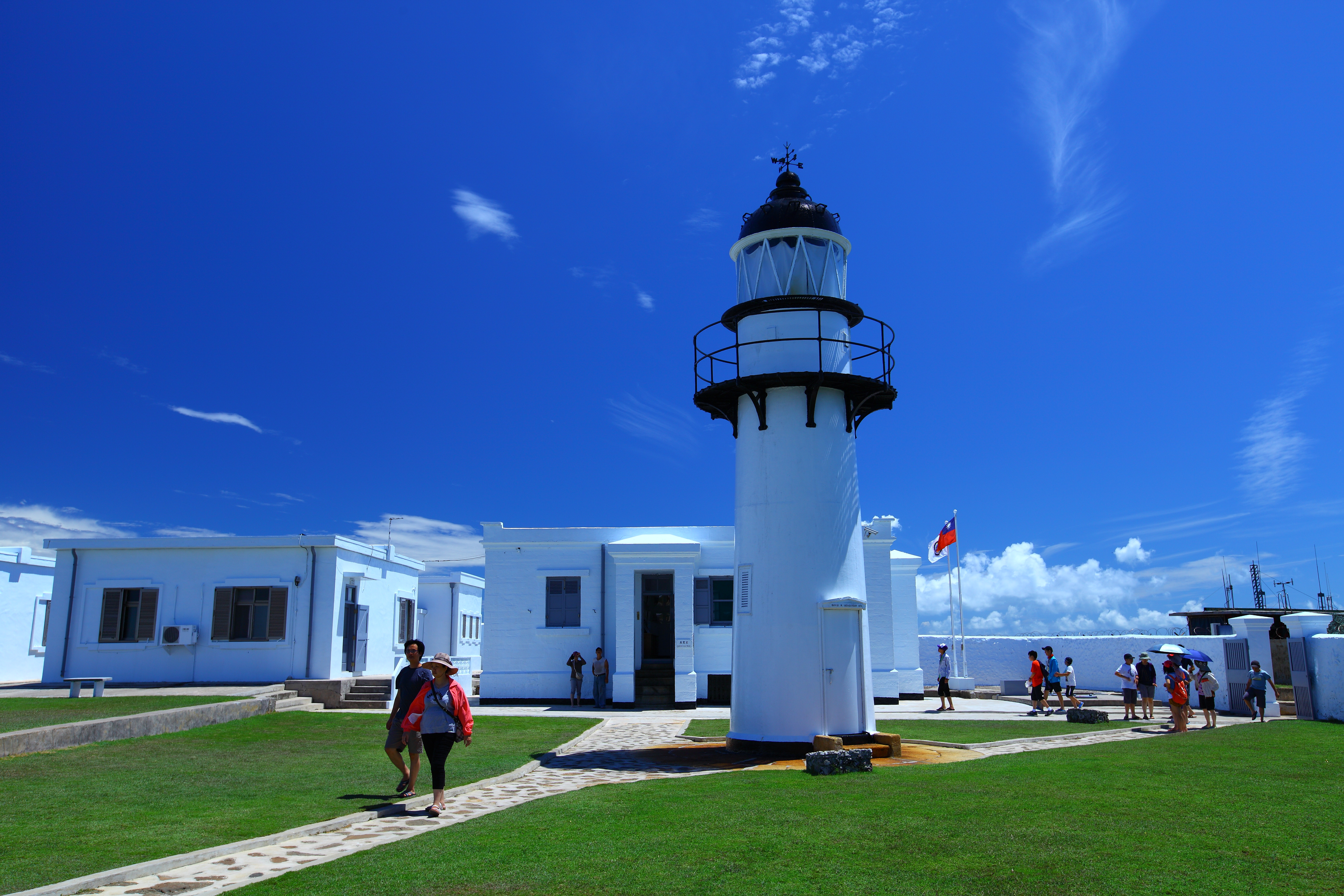 西嶼燈塔位於西嶼鄉西邊海濱，又名漁翁島燈塔，為二級古蹟，創建於1778年，經過多次整修，在1824年才有今日的白色圓柱的西洋式外型，是台澎地區最早建造的現代化燈塔。